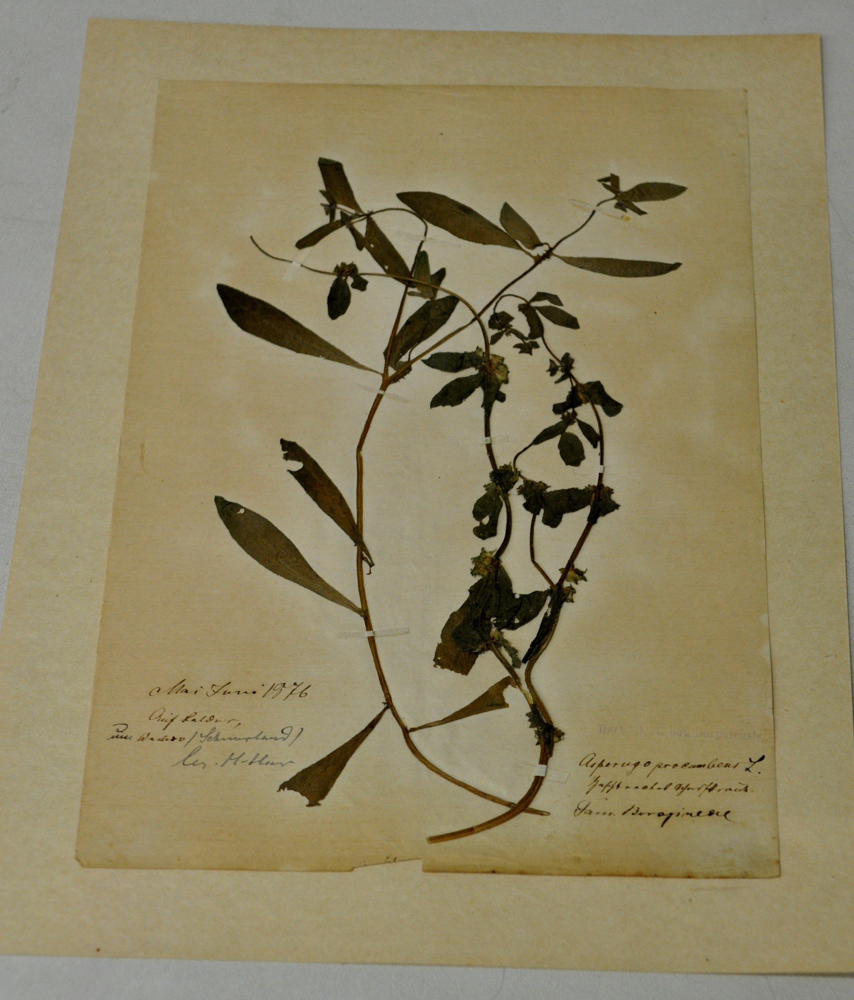 Herbaarium aastast 1876. Karerohi e. Asperugo Procumbens.